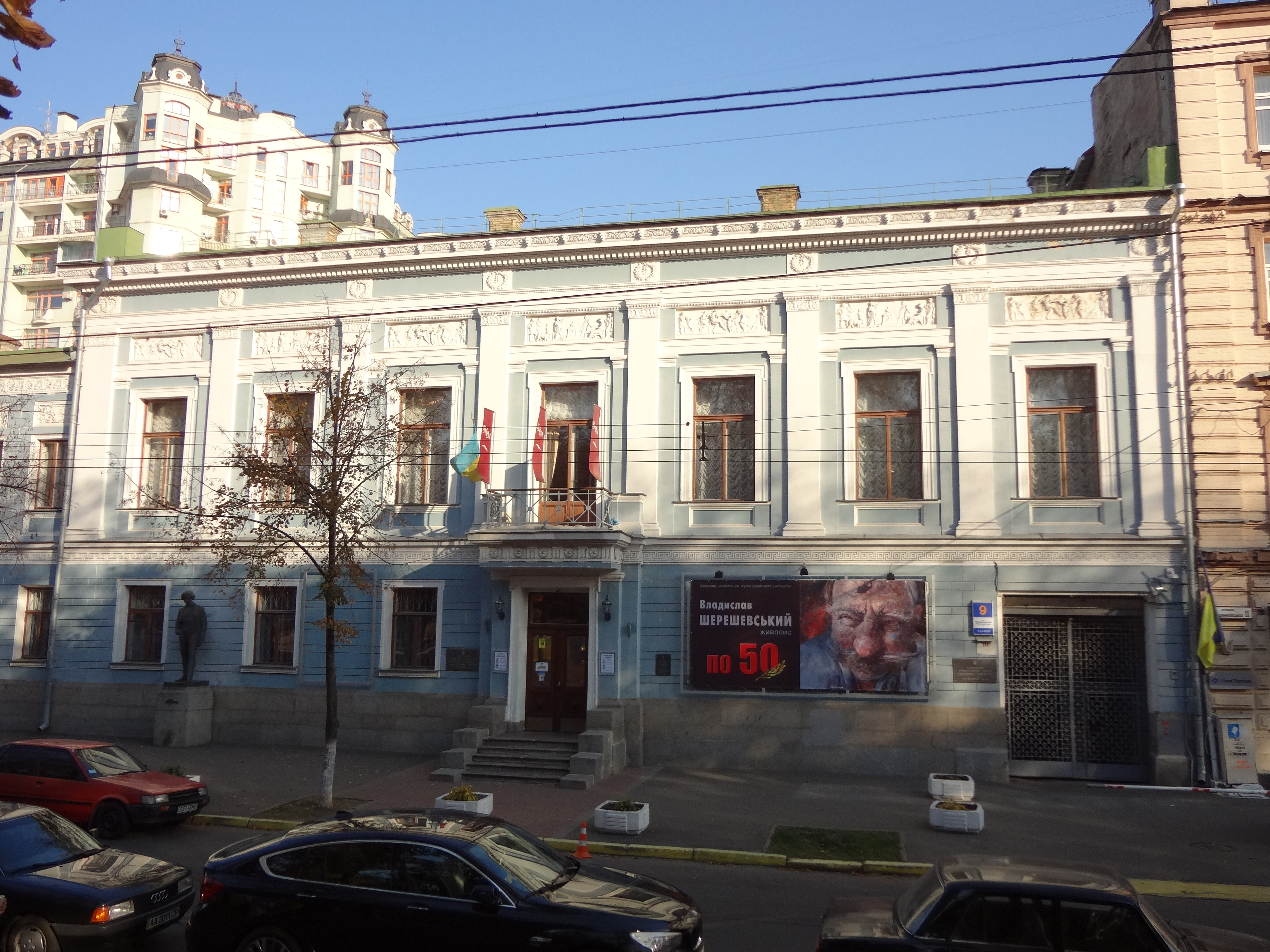 Будинок Київського музею російського мистецтва, де містилася приватна колекція Ф. А. Терещенка, Київ, Терещенківська вул., 9